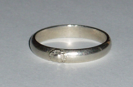 Talvisodan aikana kultaisen sormuksen tilalle vaihdettu rautasormus. Foto: Ohto Kokko